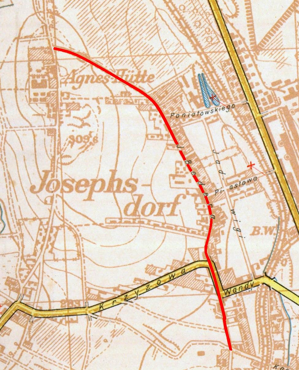 Mapa ulicy Józefowskiej (ówczesnej ul. J. Bedera) w Katowicach-Wełnowcu, mapa pochodzi z 1939, autorstwa Generalstab des Heeres, 9 Abt. ul. Wandy - dzisiejsza ulica Rysia ul. Piastowa - dzisiejsza ulica Gnieźnieńska ul. Poniatowskiego - dzisiejsza ulica Mieczysława Karłowicza ul. Jadwigi - dziesiejsza ulica Modelarska